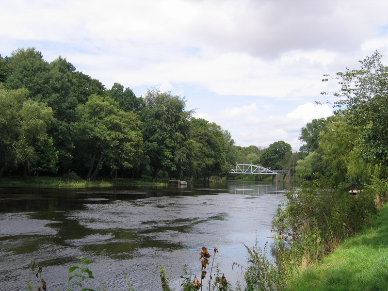 Ängelholm Rönne å